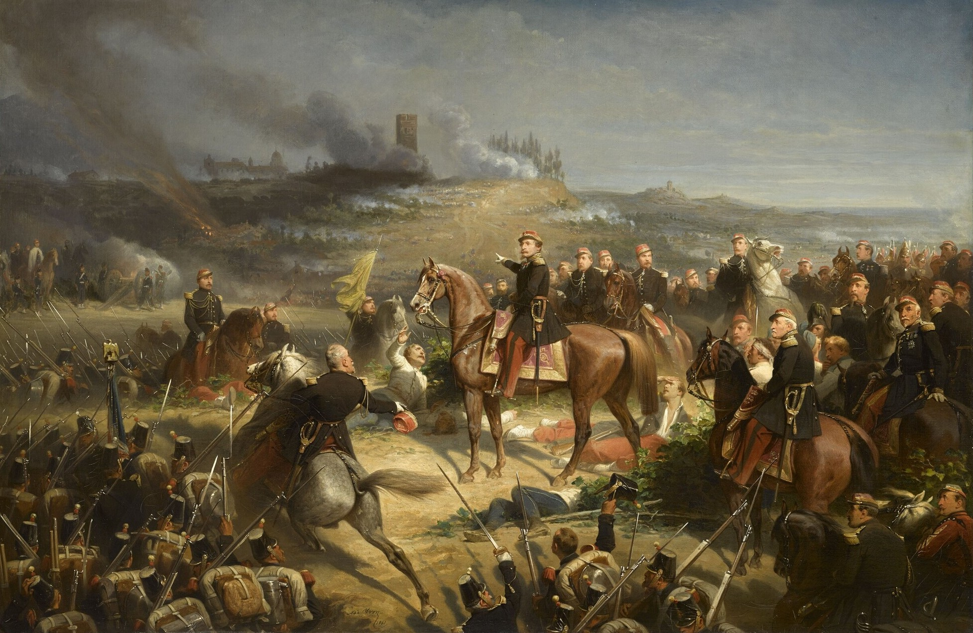 Compiègne, France: Château de Compiègne - Musée du Second Empire - Adolphe Yvon: Bataille de Solférino